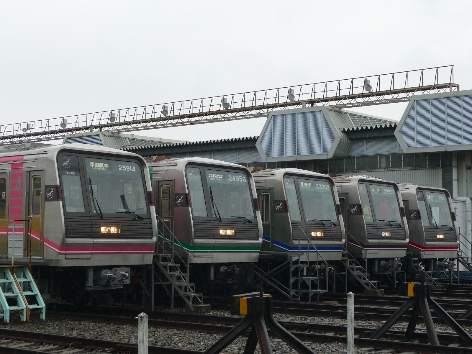 新20系（右から21系,22系,23系,24系,25系）